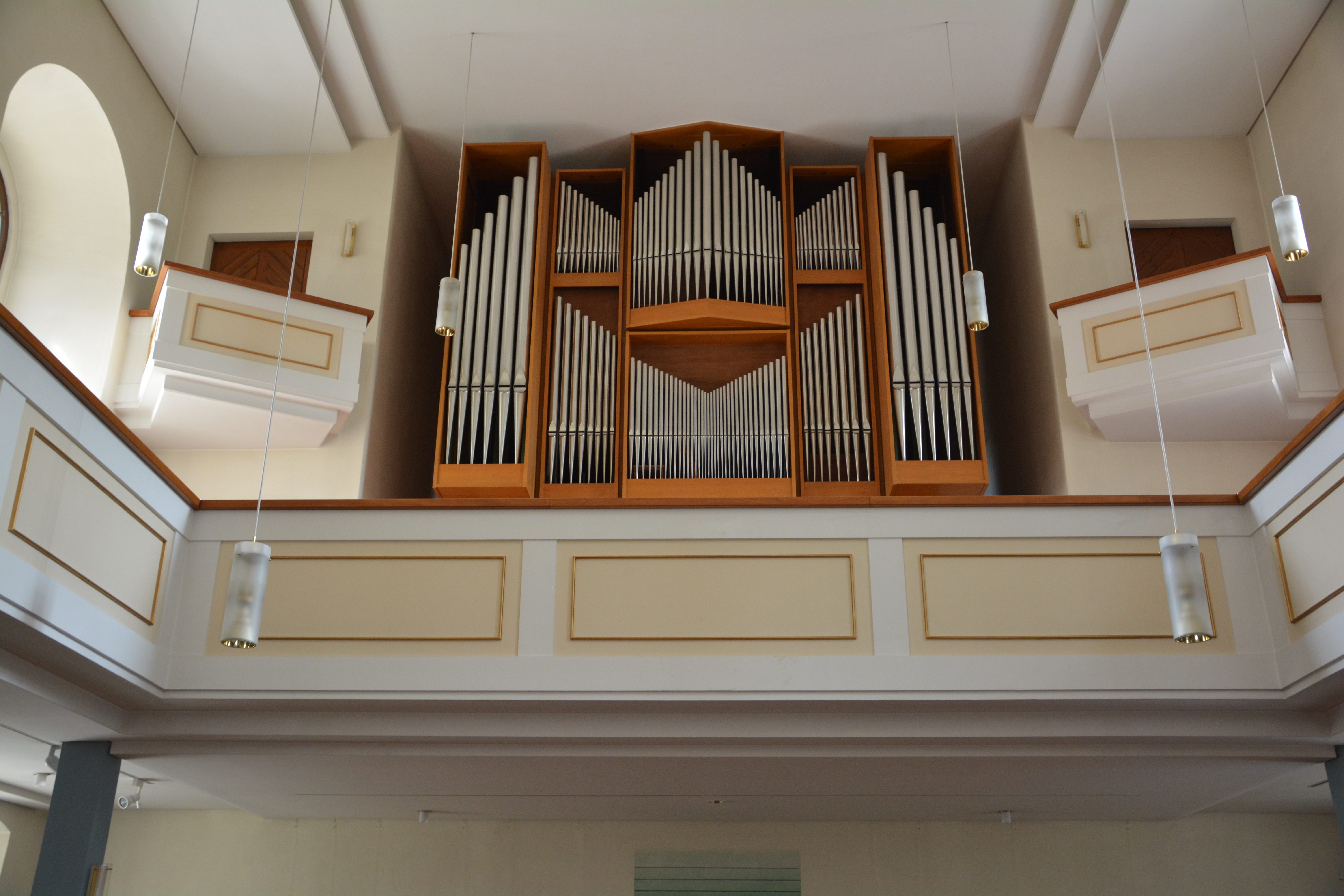 Stadtkirche "Zum Heiligen Namen Gottes" Radeberg, Innenansicht